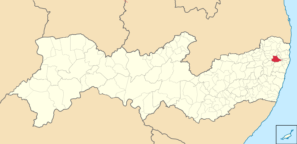 Mapa de Paudalho (2)